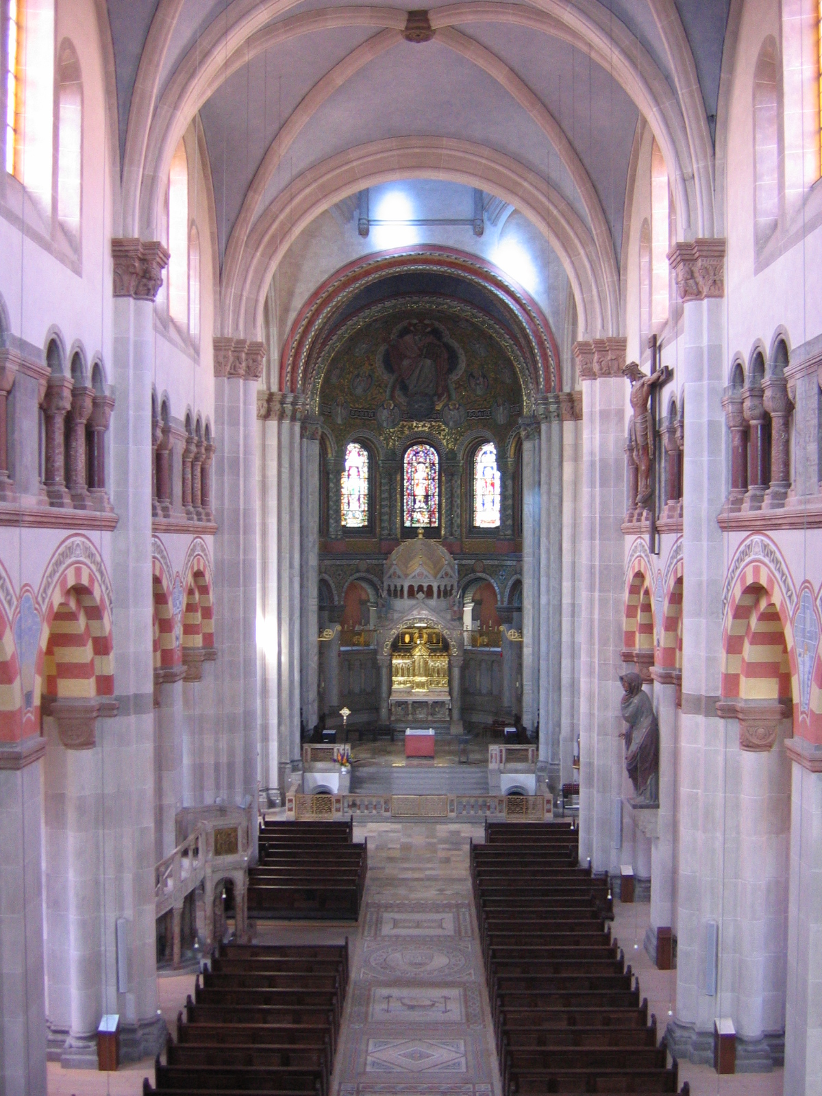 St. Benno in München-Neuhausen: Innenraum gen Osten